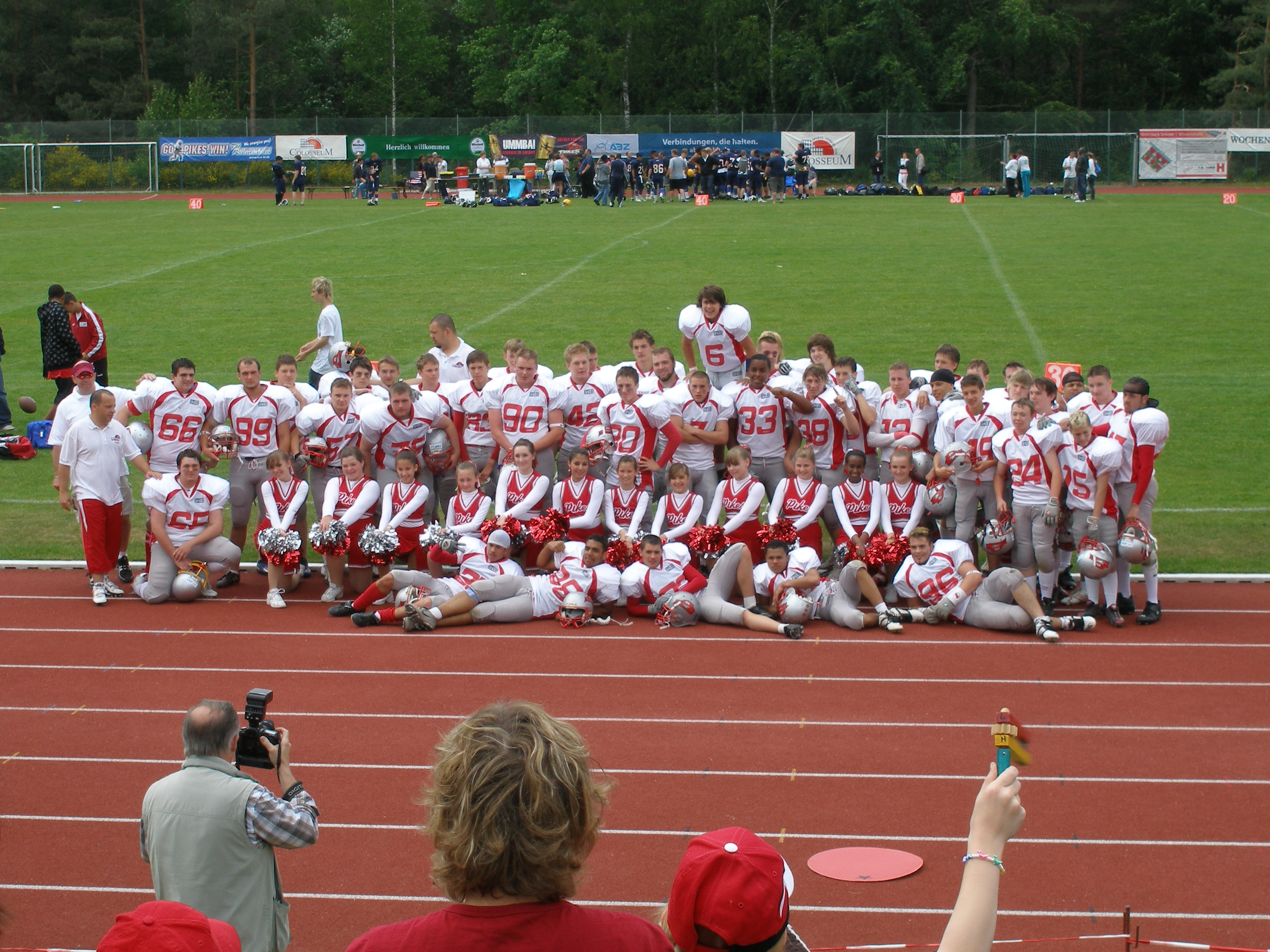 Die Jugendmannschaft (und Cheerleader) der Kaiserslautern Pikes nach dem Spiel gegen die Weinheim Longhorns